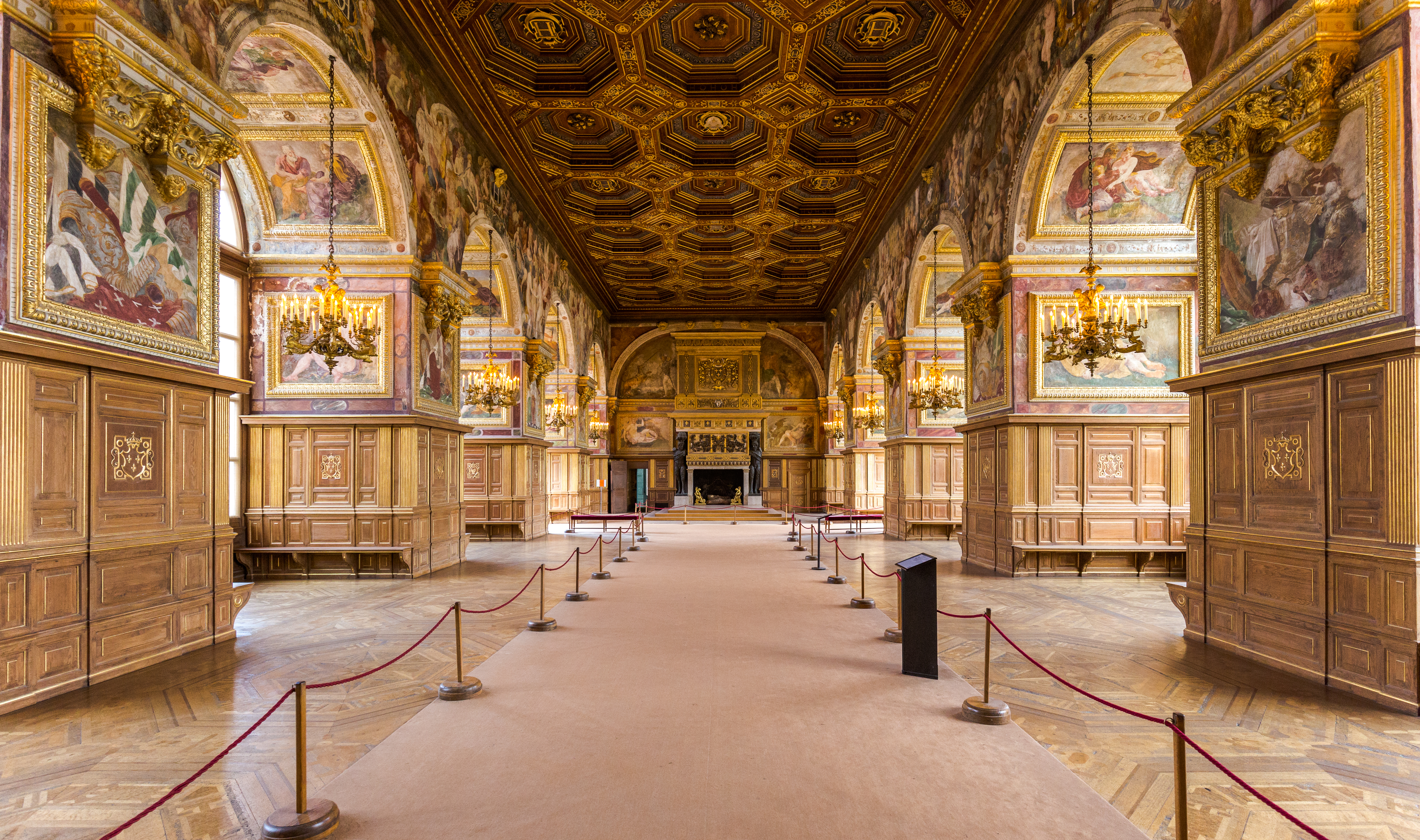 La salle de bal, Château de Fontainebleau .